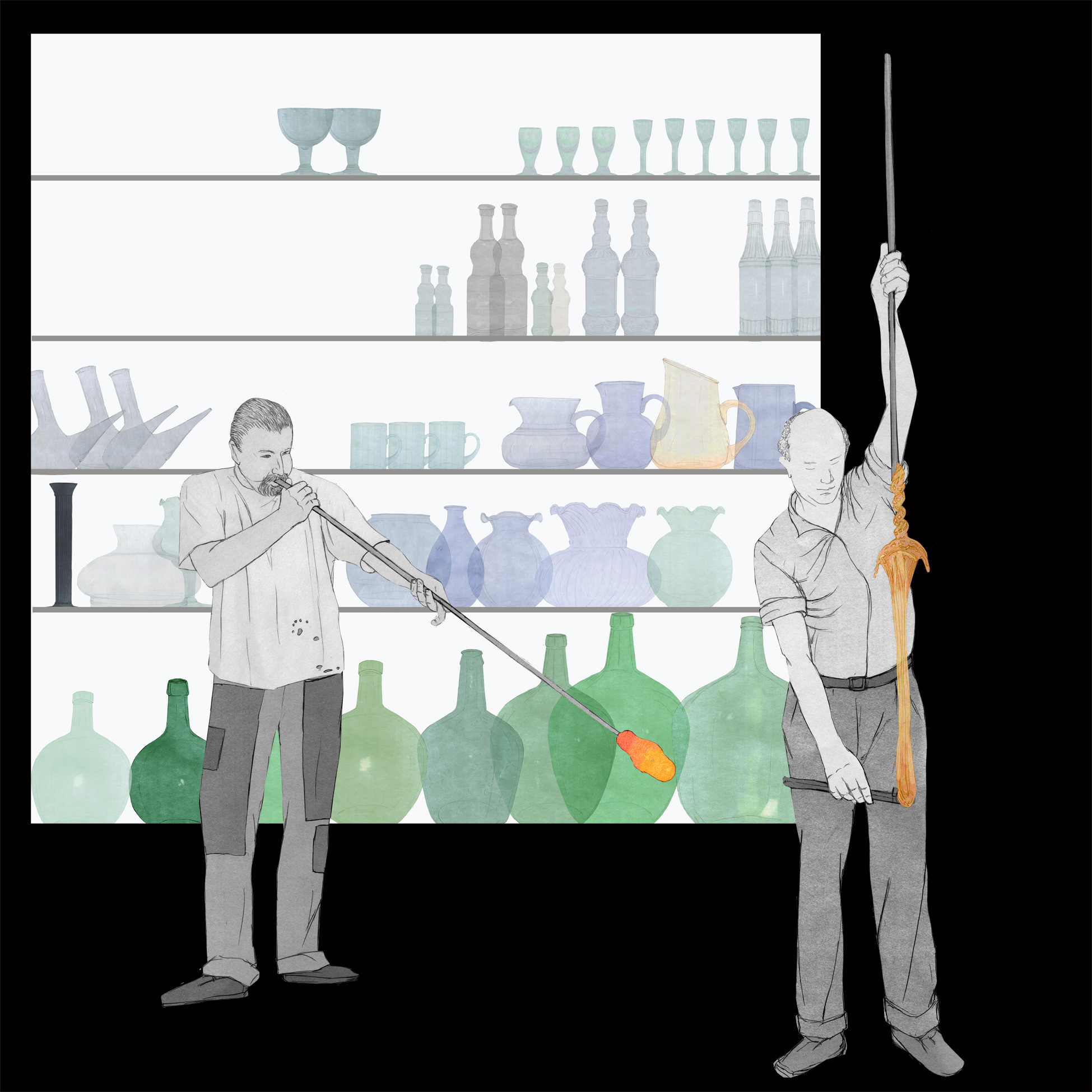 Imatges realitzades pel Museu Valencià d'Etnologia (Andrés Marín Jarque) per al Museu Comarcal de la Vall d'Albaida (Benissoda).